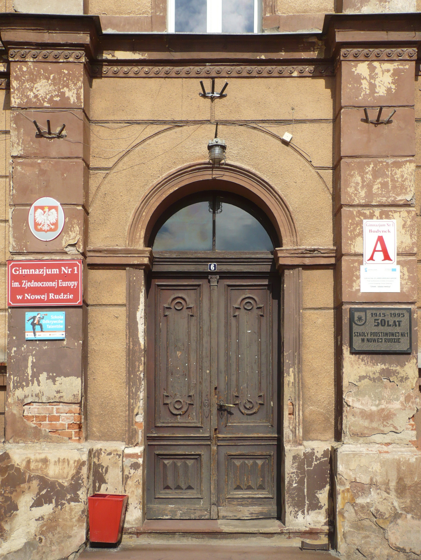 Nowa Ruda. Gimnazjum Nr 1